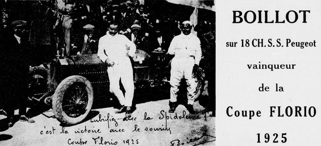 André Boillot, vainqueur de la Coppa Florio 1925 sur Peugeot 18CV S.S.